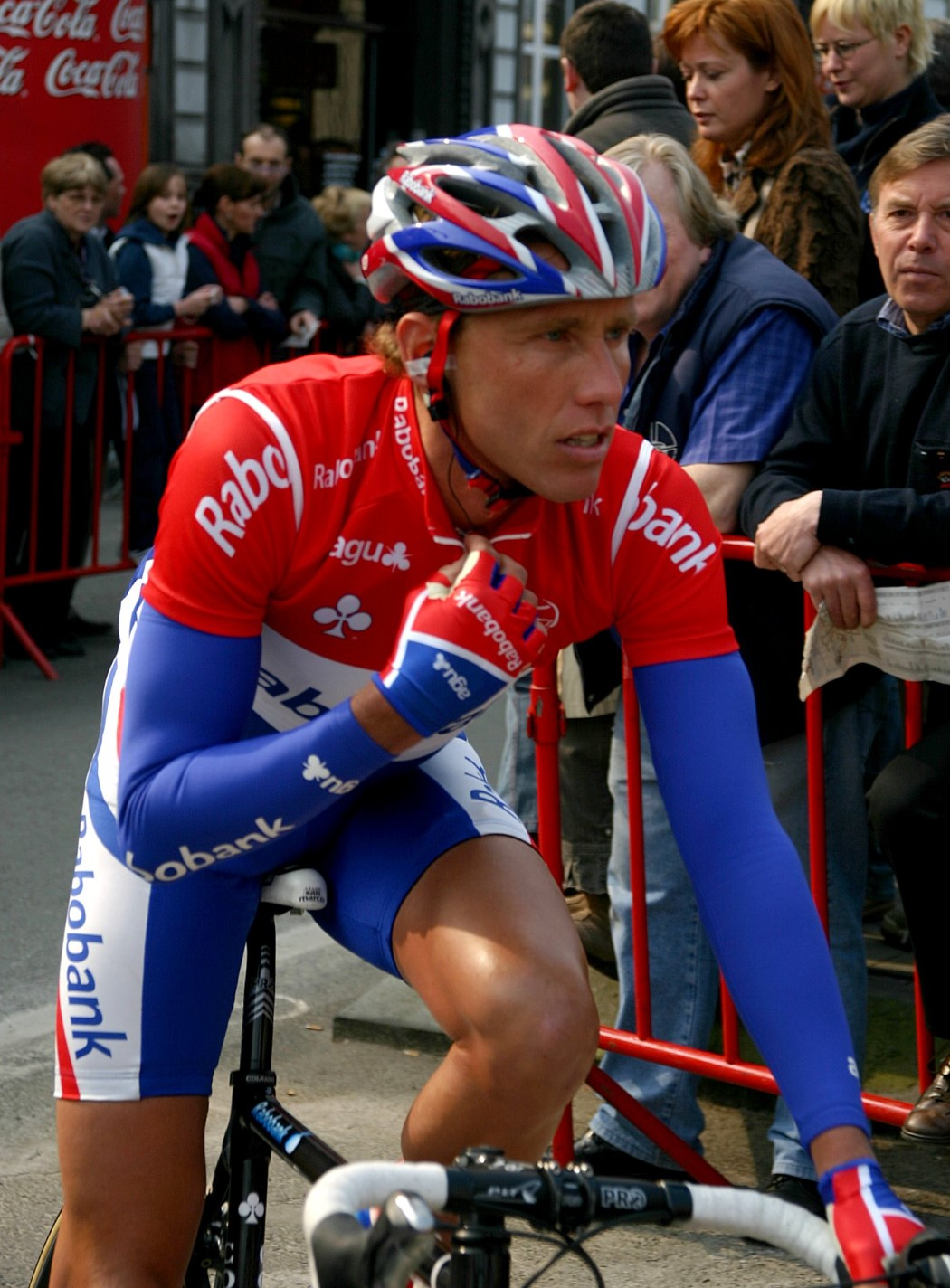 boogerd